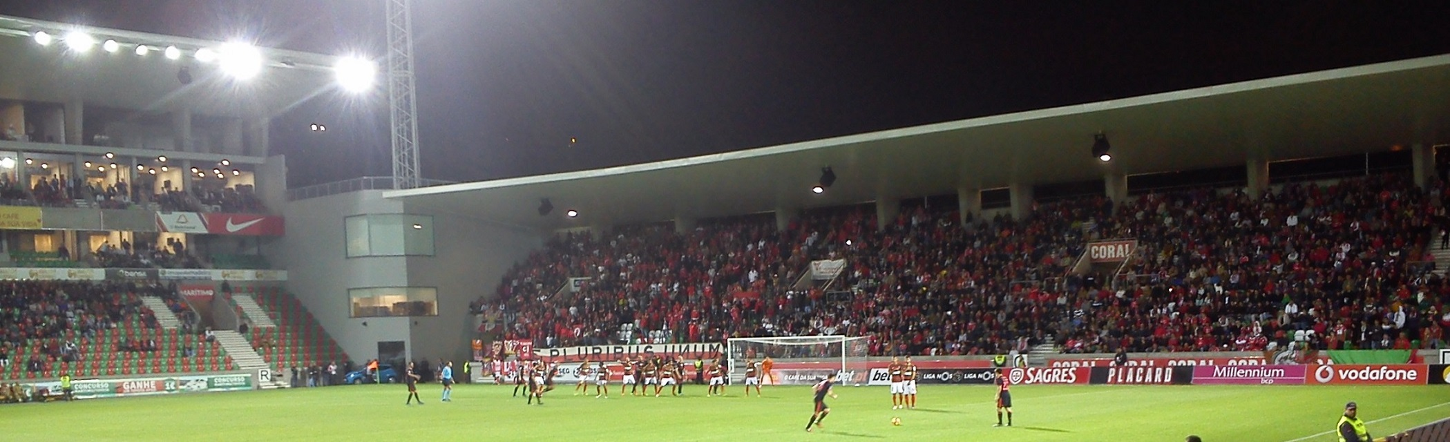 Inauguração da Bancada Central do Estádio dos Barreiros - 02-12-2016 - Marítimo 2 - Benfica 1